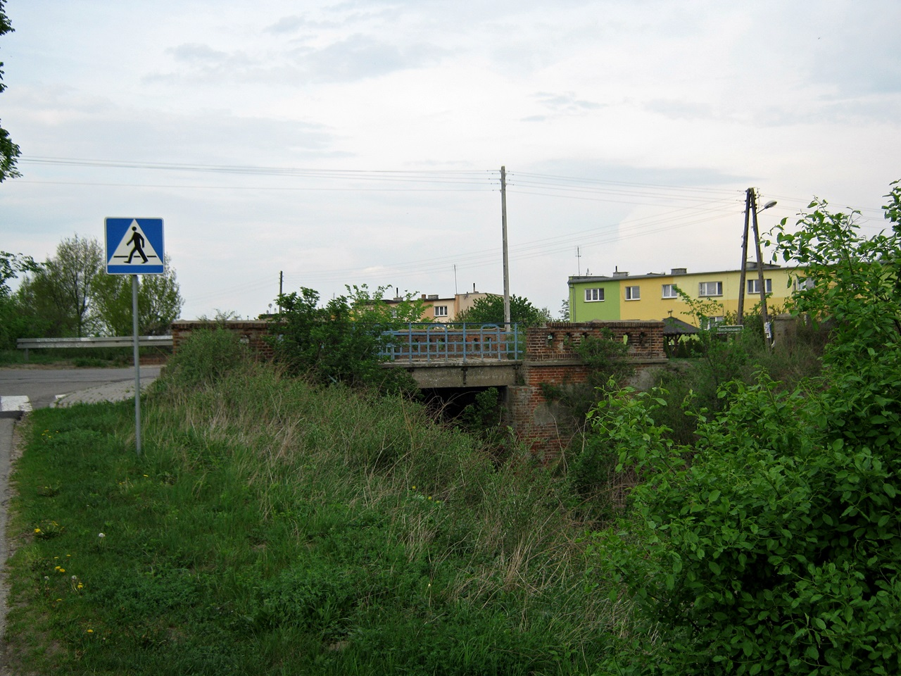 Pozostałości po wiadukcie nad dawnym torowiskiem linii Września Wąsk.- Arcugowo- Niechanowo. Nad dawnymi torami przebiega droga Czerniejewo- Witkowo